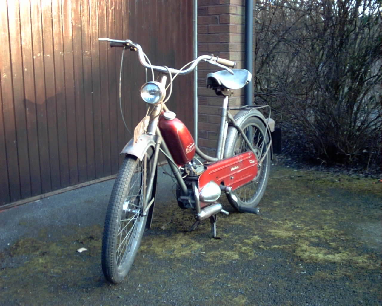 1960 Phillips Panda Mark1